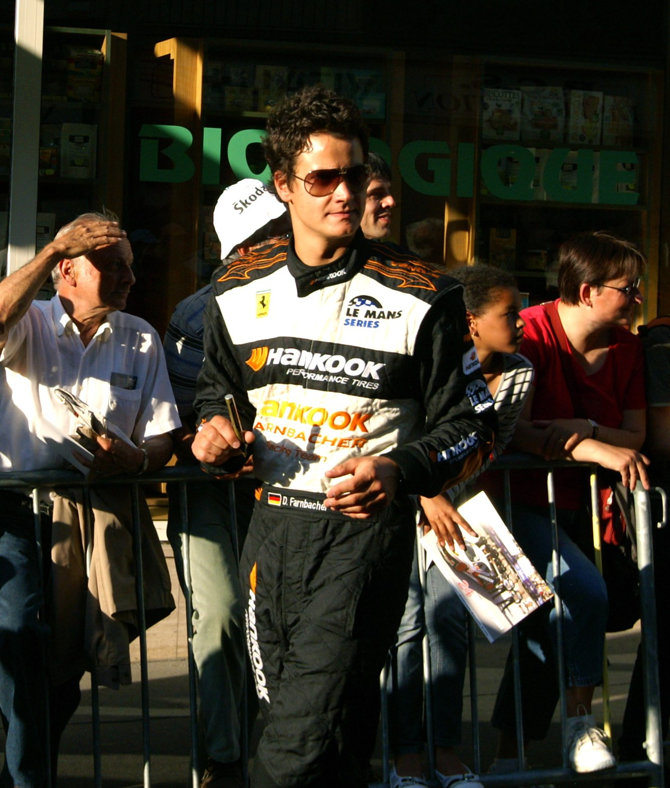 Le Mans 2010, Drivers' Parade